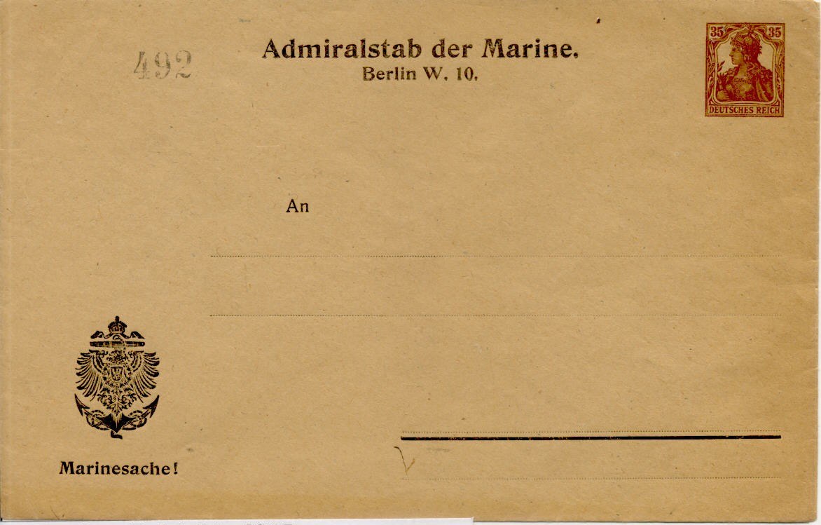 Rohrpost-Dienstumschlag als Privatganzsache mit Eindruck des Wertstempels 35 Pf Germania